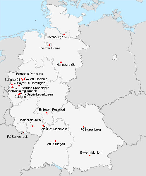 Répartition des clubs en 1.Bundesliga 1985-1986.